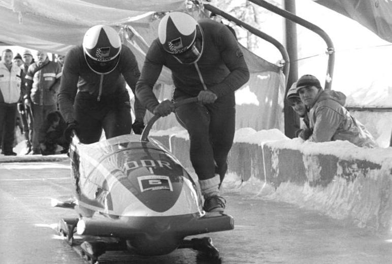 Wolfgang Hoppe, Bogdan Musiol ADN-ZB Hiekel 11.3.88 Bez. Dresden: Bobmeisterschaft-Sieger der DDR-Meisterschaften im Zweierbob wurden Wolfgang Hoppe und Bogdan Musiol vom ASK Vorwärts Oberhof. In zwei der vier Läufe auf der kombinierten Kunsteisbahn in Altenberg markierte das Duo neue Bahnrekorde.